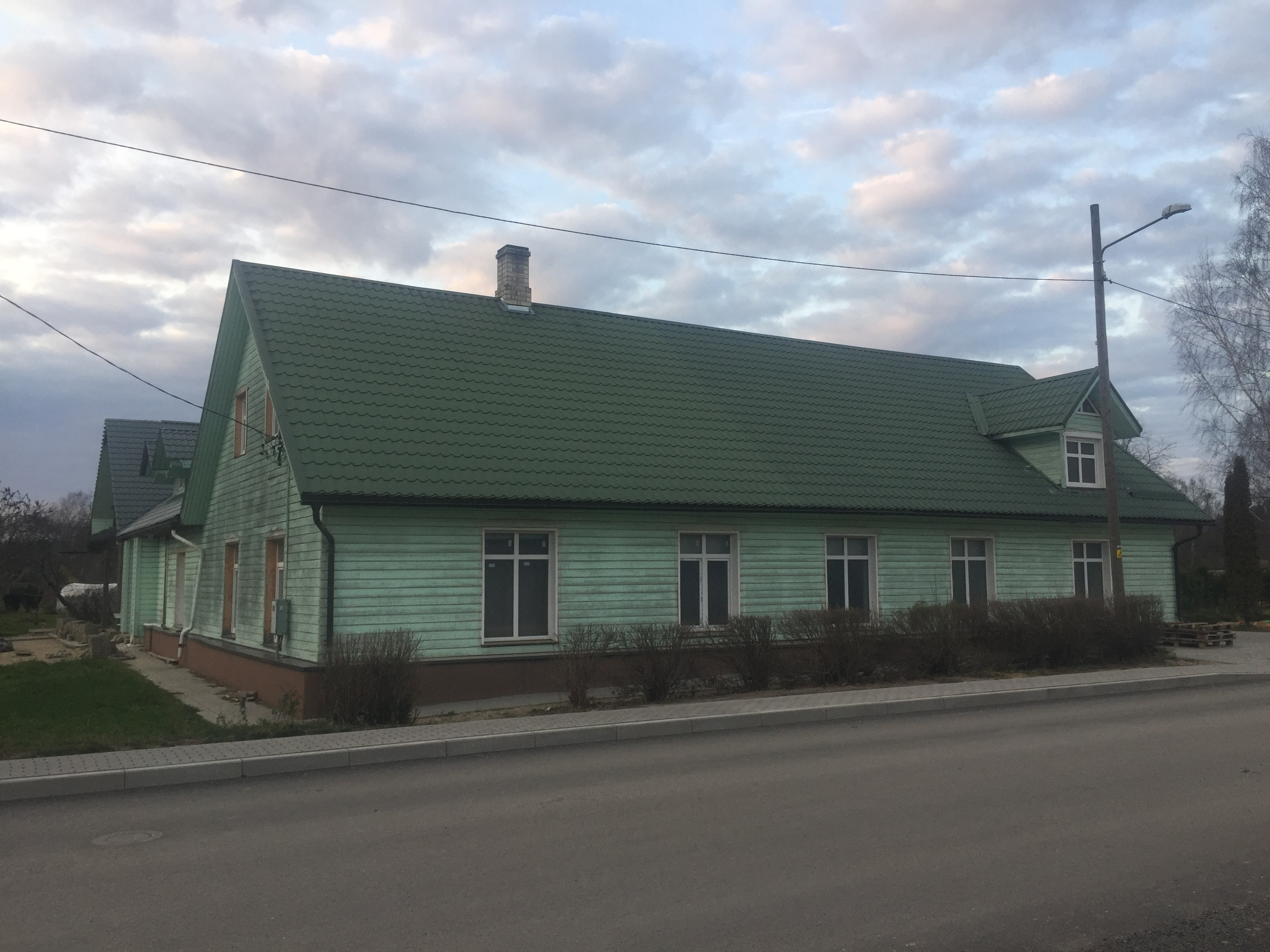 Antsla baptisti palvemaja novembris 2019.